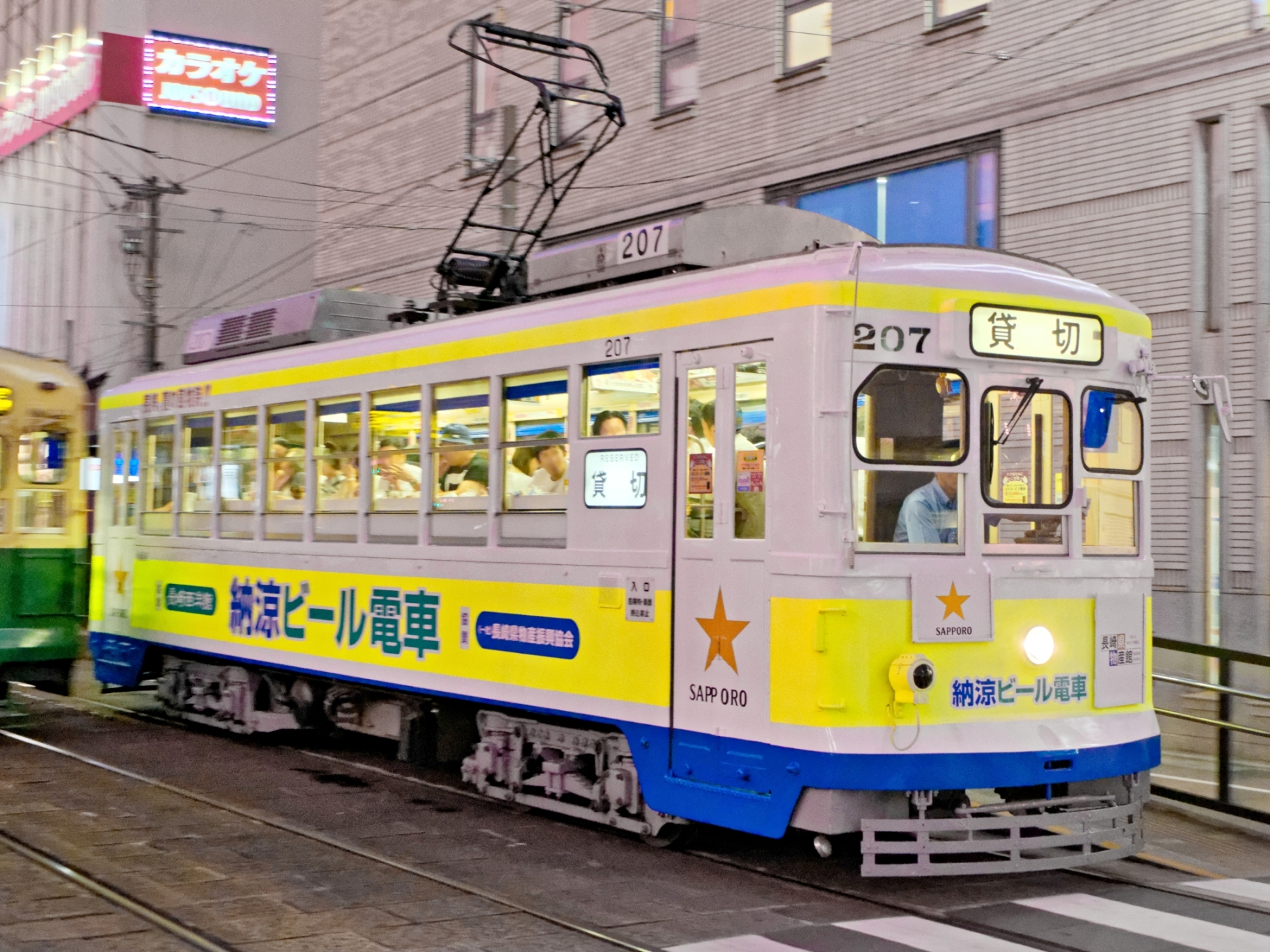 長崎電気軌道の「納涼ビール電車」。夏季のみ201形207号の専用車両を用いて運行されている。